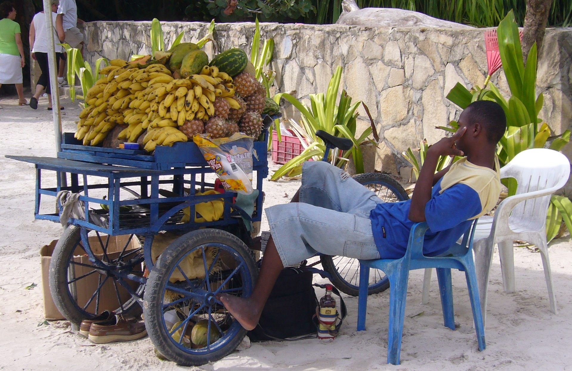 Obstverkäufer am Strand von Boca Chica